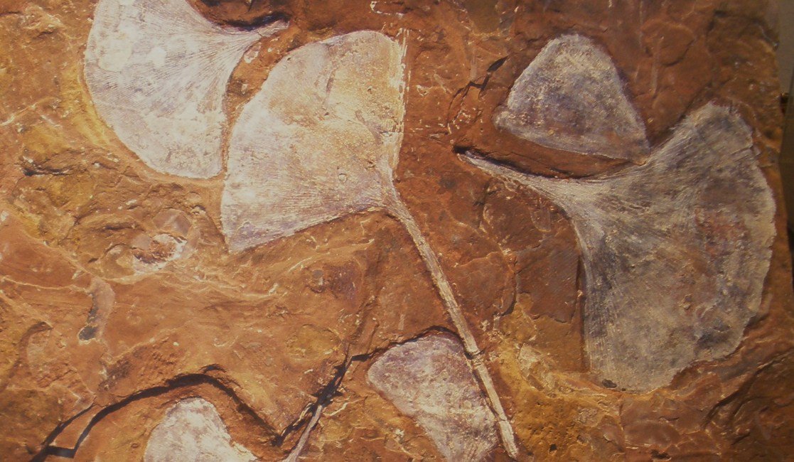 Fossil of Gingko adiantoides, an extinct plant- Took the photo at Fossil Show, Munchen 2011